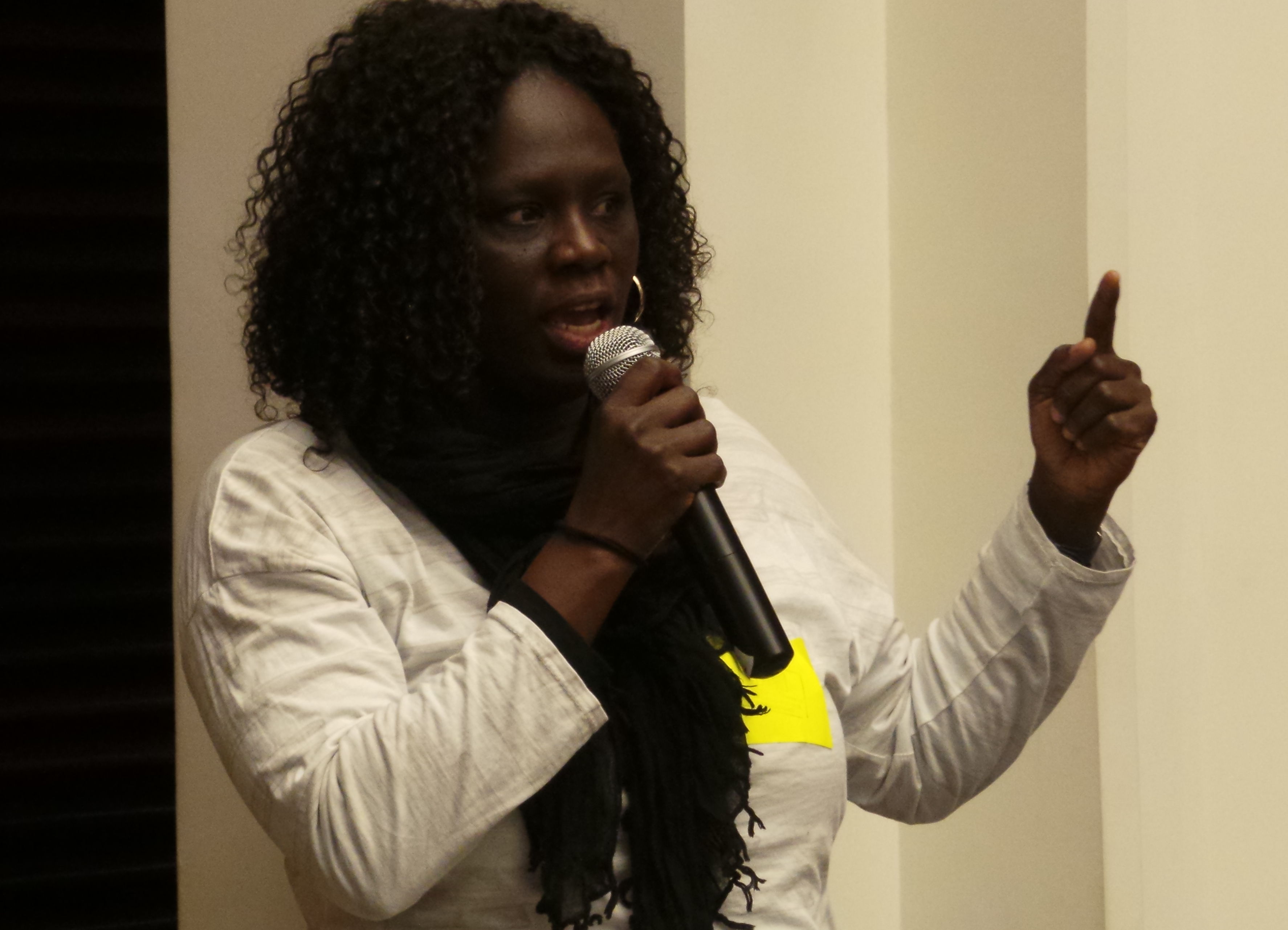 Intervención en Madrid. Jornadas Mutilación Genital Femenina